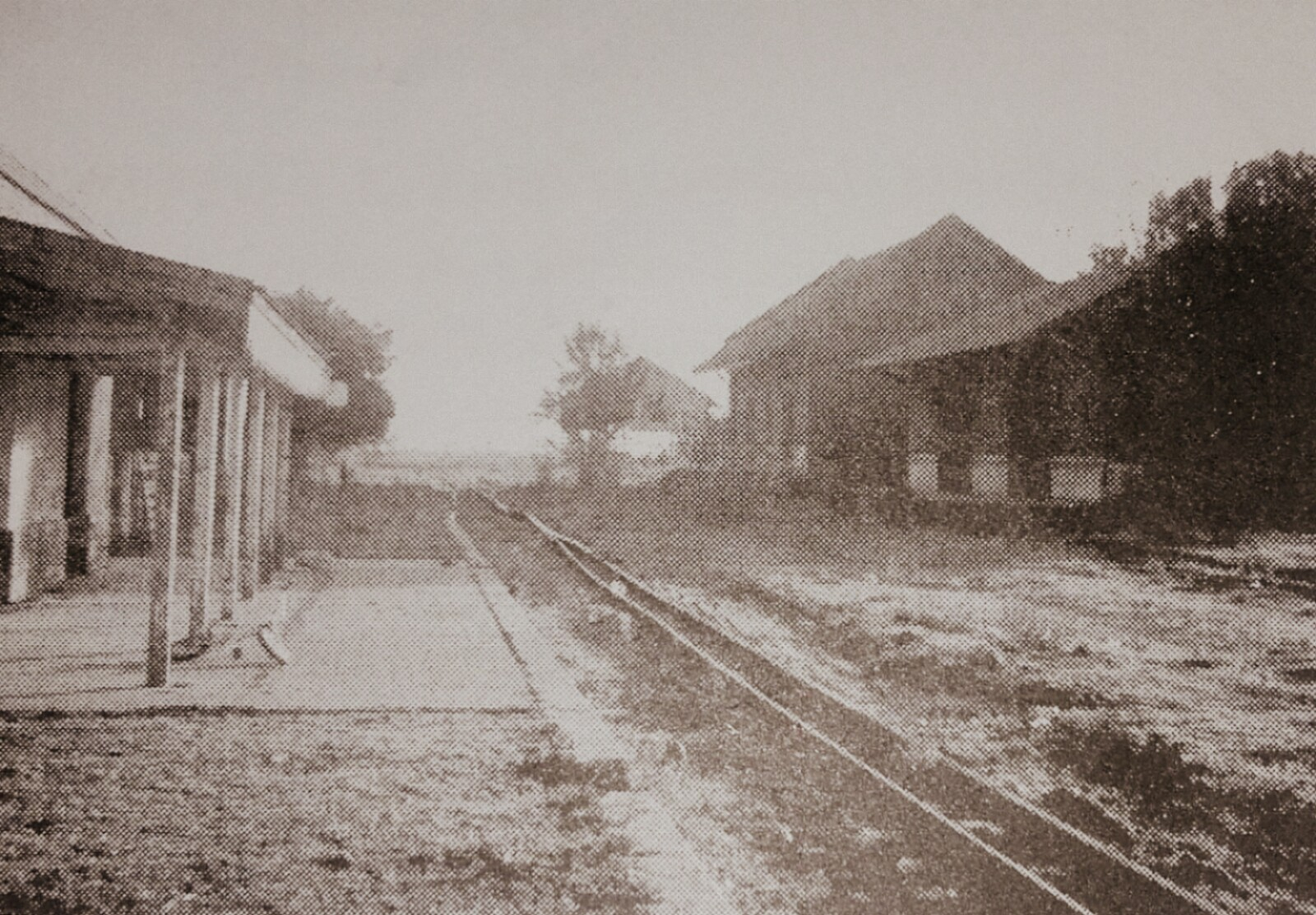 Estación de tren Ataliva.